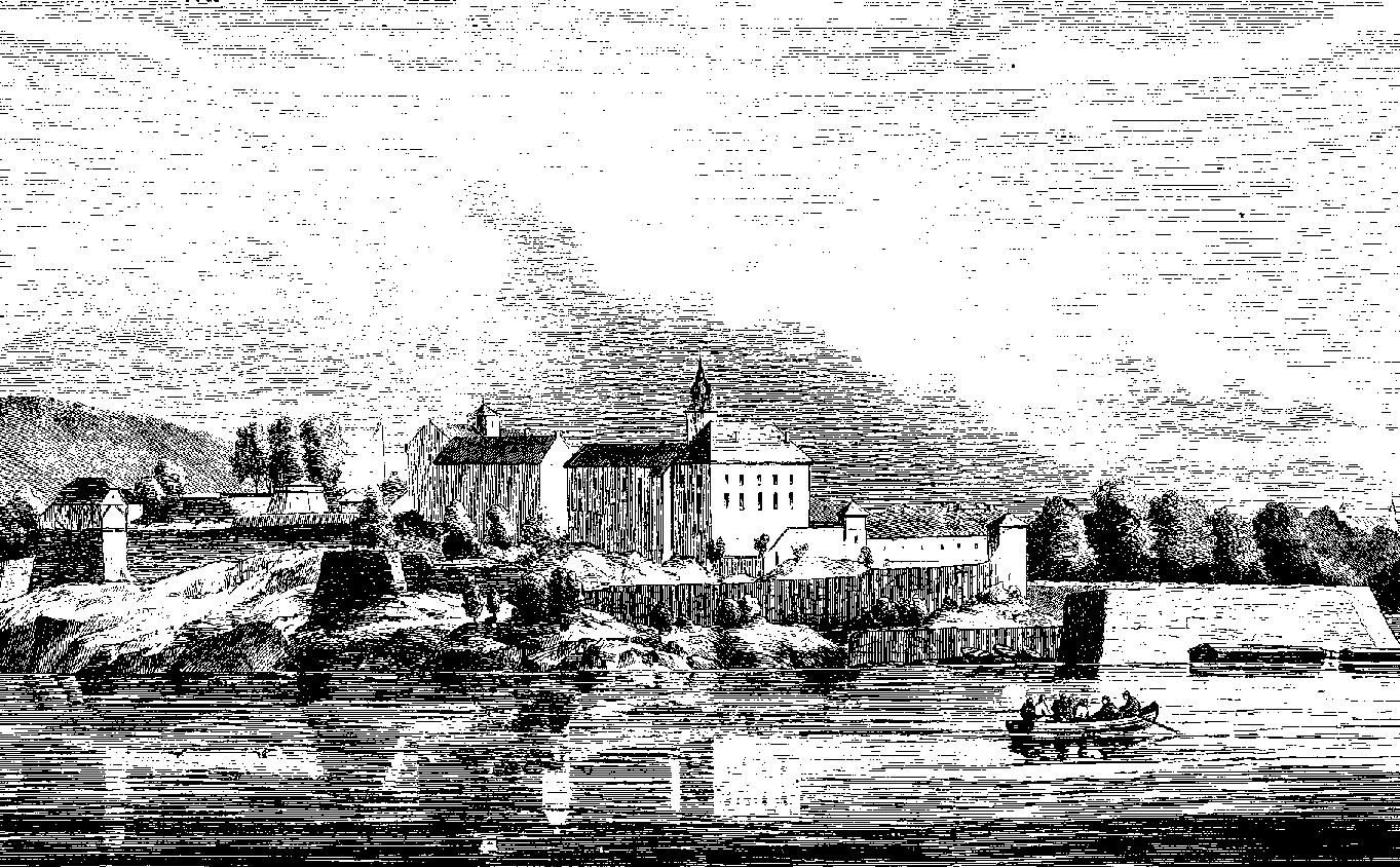 Akershus festning i Oslo.